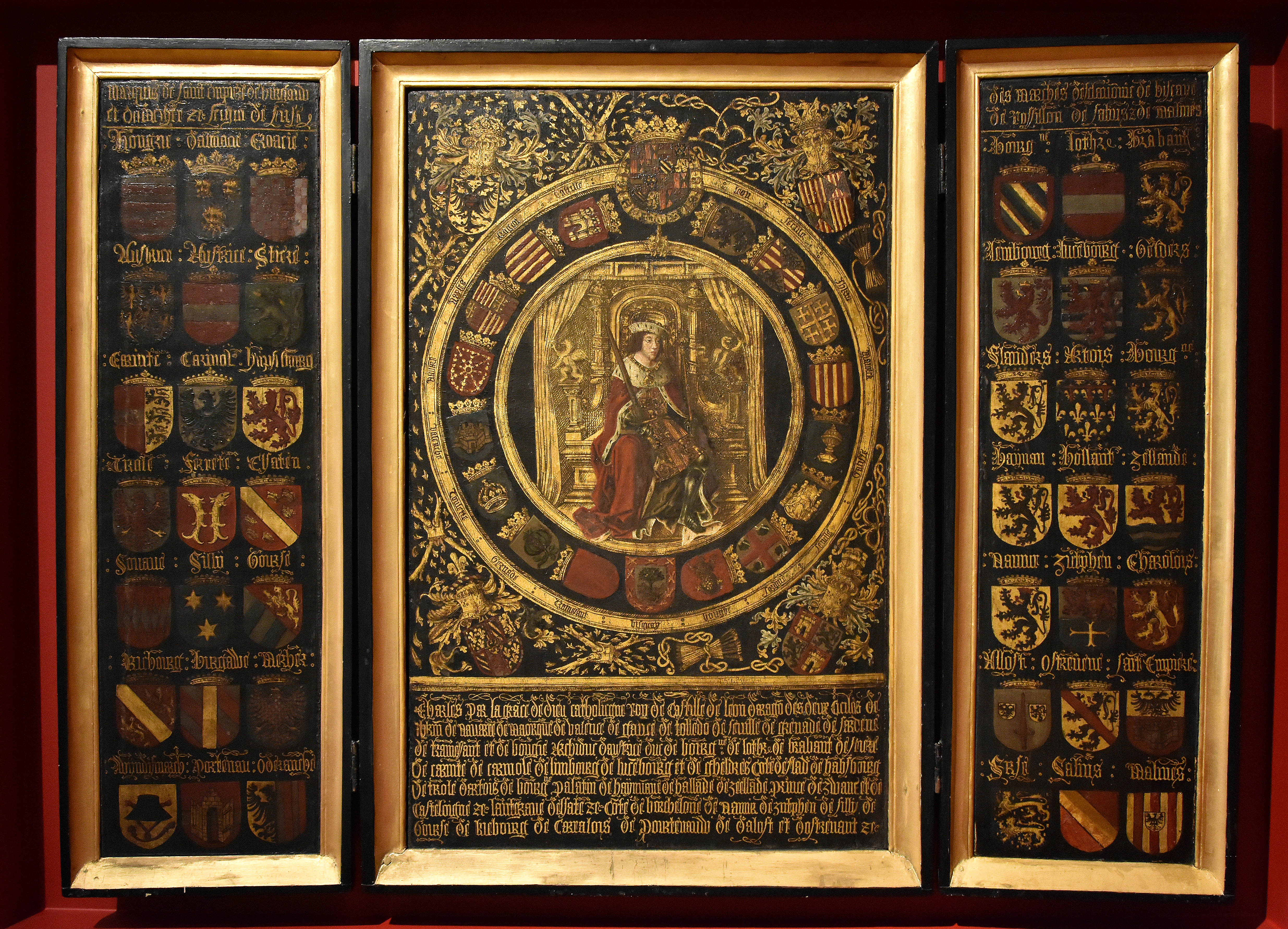 Jan van Battel (1477-1557) Triptiek met Karel van Habsburg als koning van Spanje - Museum Hof van Busleyden Mechelen This photo of movable heritage has been taken in the Flemish Region